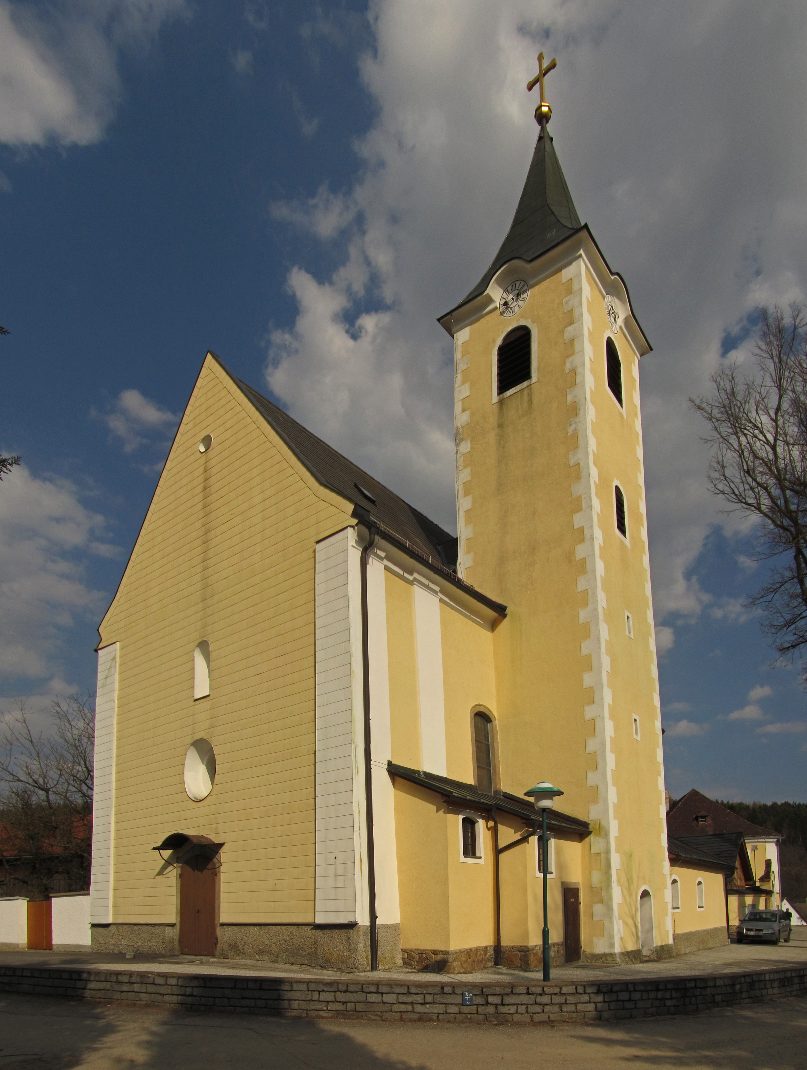 Kath. Pfarrkirche hl. Johannes der Täufer und ehem. Friedhof